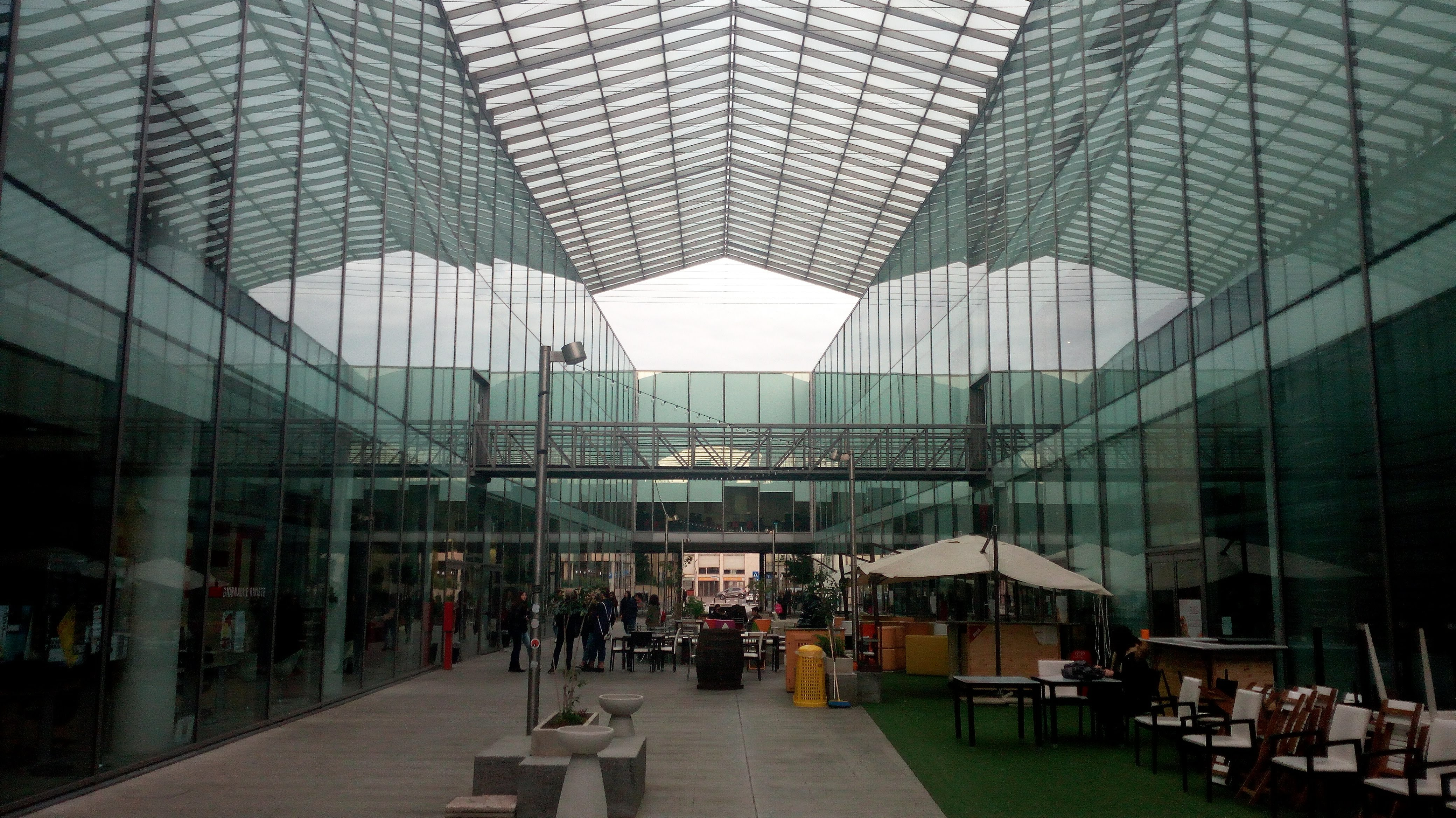 Il cortile interno della MEM (Mediateca del Mediterraneo) a Cagliari